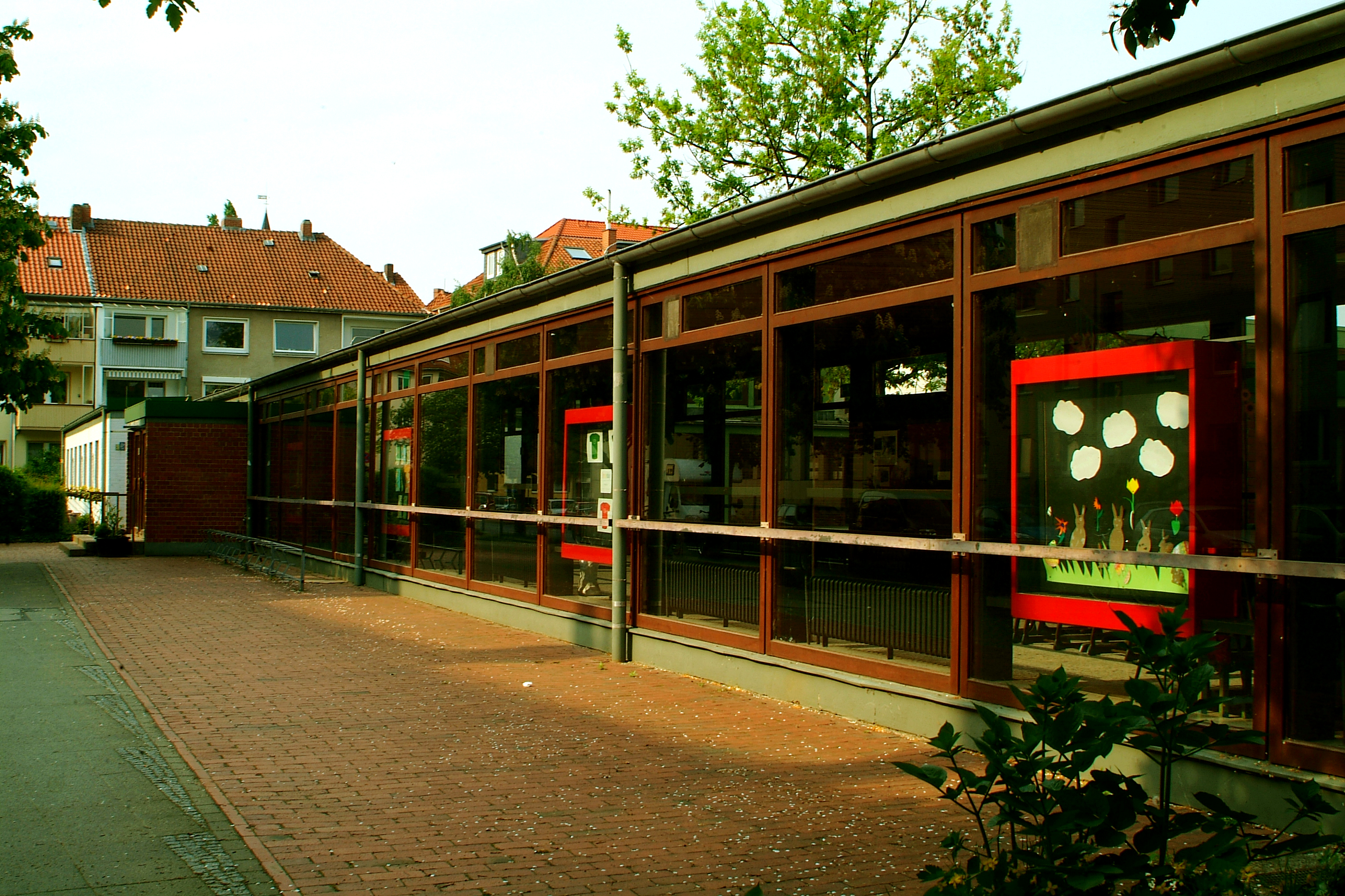 Sie haben ein besseres Bild? Sogar ein historisches Dokument als Bild(ungsförderung)? Zeigen Sie' s uns. Stiften Sie es - Ihren Kindern, unseren Enkeln, allen Menschen. Hier.